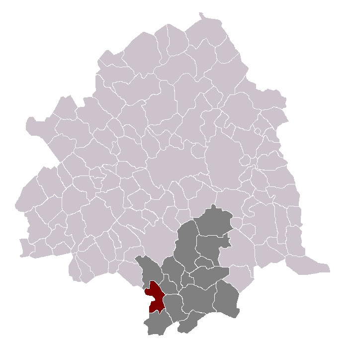 Wahagnies dans son canton et son arrondissement